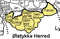 Ølstykke Herred Frederiksborg Amt , Denmark. Map by Svend-Erik Christiansen, edited by user:Nico-dk .